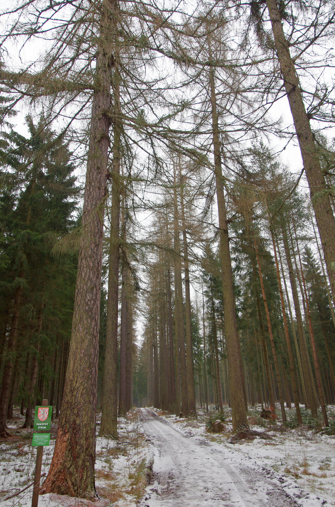 Šindelová, Krušné hory, dvouřadá modřínová alej s 84 stromy, velmi vysoké modříny s nádhernými přímými kmeny, alej dnes zaniká ve vzrostlé smrčině, památné stromy jsou po obou stranách lesní cesty